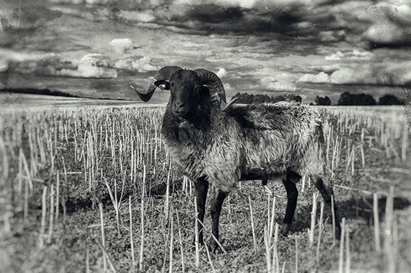 Bebelsheim: Im Biosphärenreservat Bliesgau ein Heidschnuckenbock in Bebelsheim